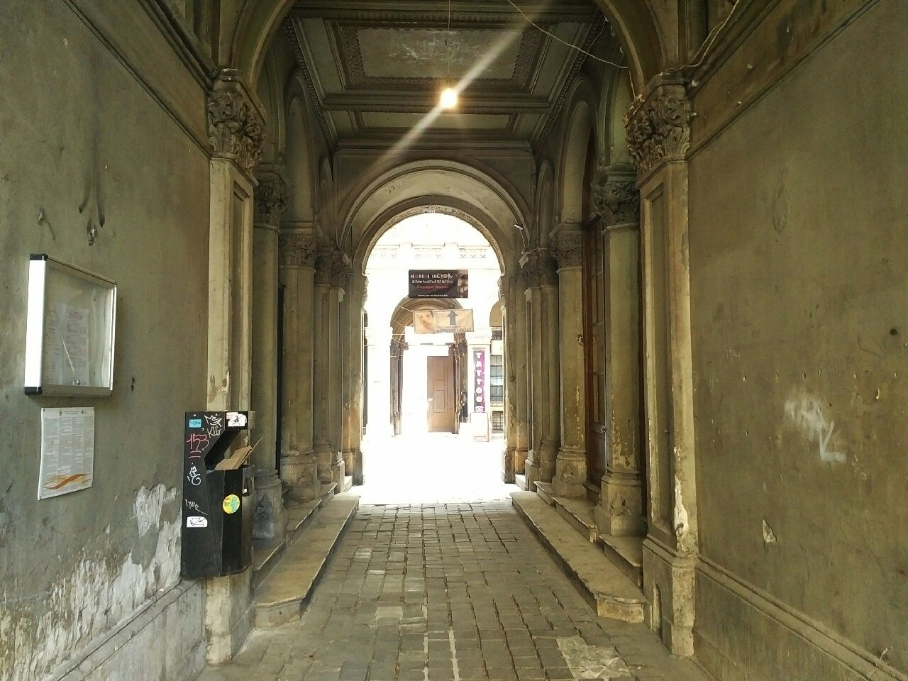 Az Unger-ház átjárója, a Múzeum körúti bejáratból fényképezve.